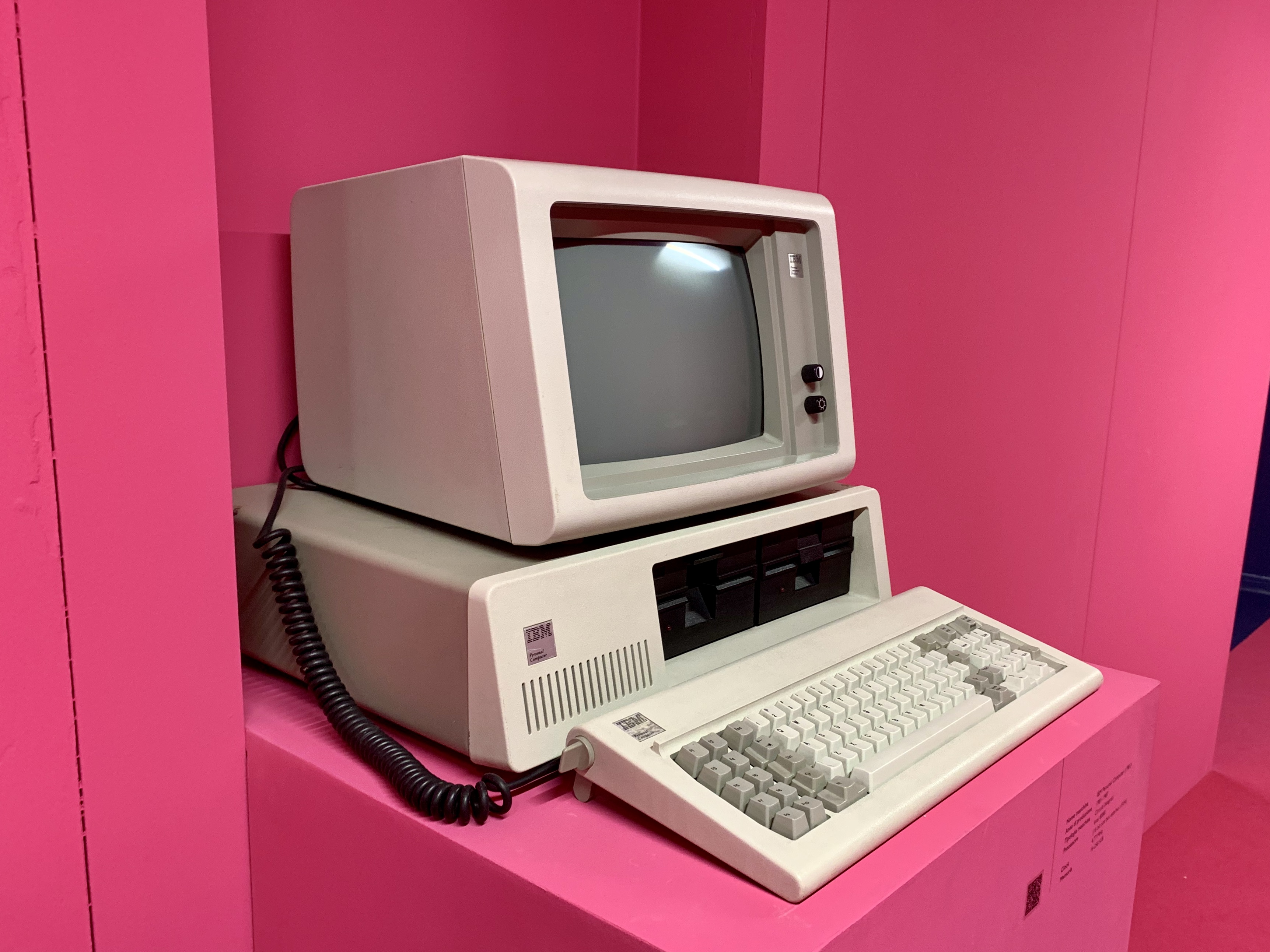 IBM Personal Computer del 1981 del Museo degli strumenti per il calcolo di Pisa ed esposto nella mostra Hello World! (2019-2020).